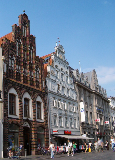 Kröpeliner Straße, Rostock, Stadtbibliothek